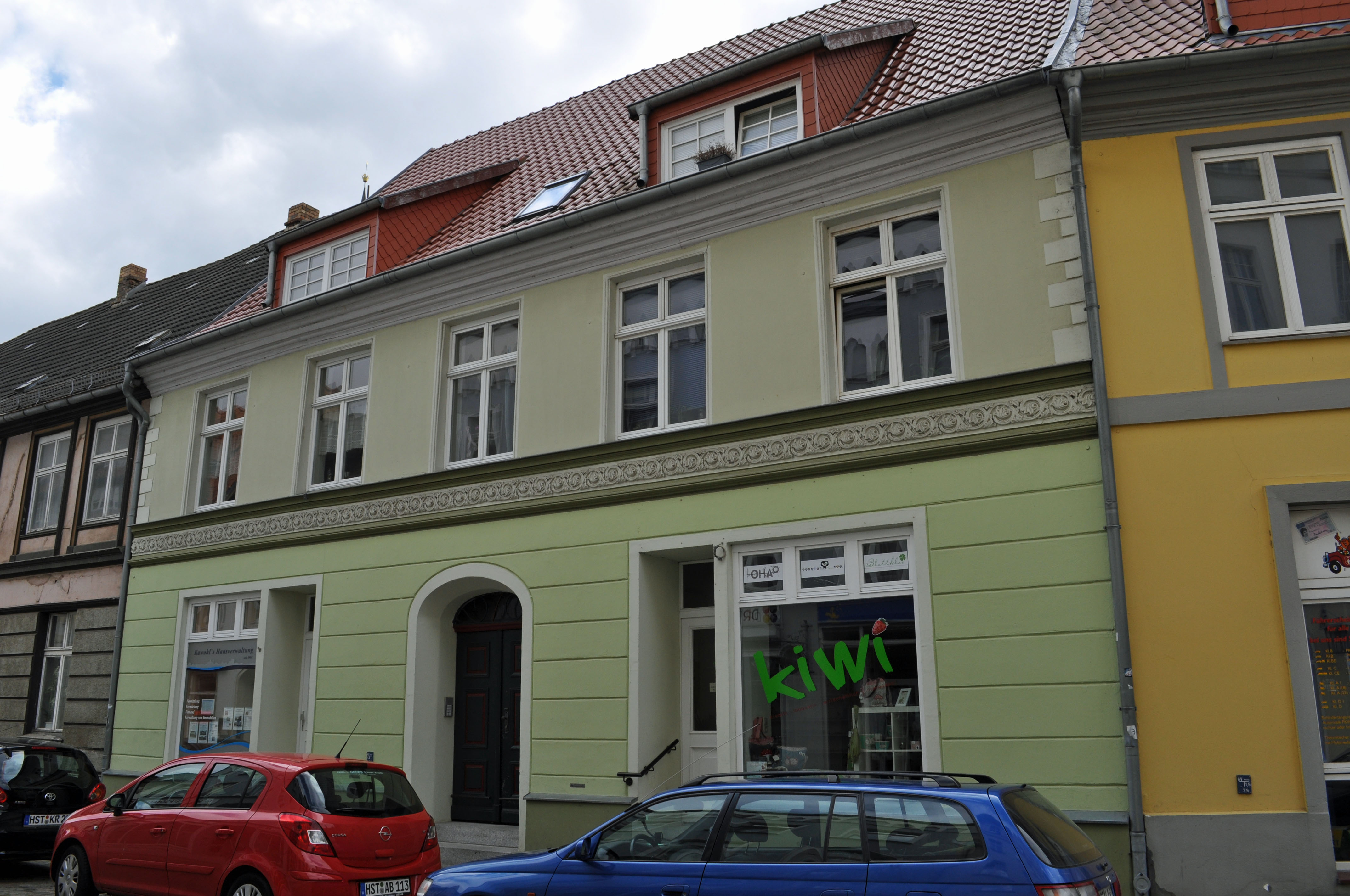 Gebäude in Stralsund, siehe Dateiname